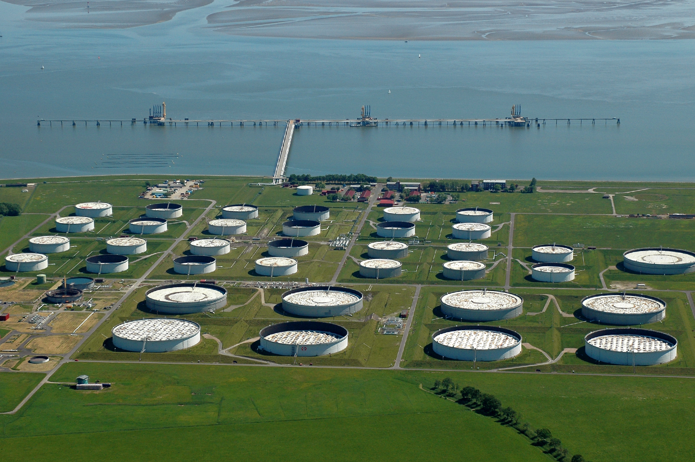 Fotoflug vom Flugplatz Nordholz-Spieka über Cuxhaven und Wilhelmshaven, hier zu sehen: Mineralöltanklager der Nord-West Oelleitung.